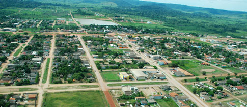 Vista Aerea de NOvo Progresso